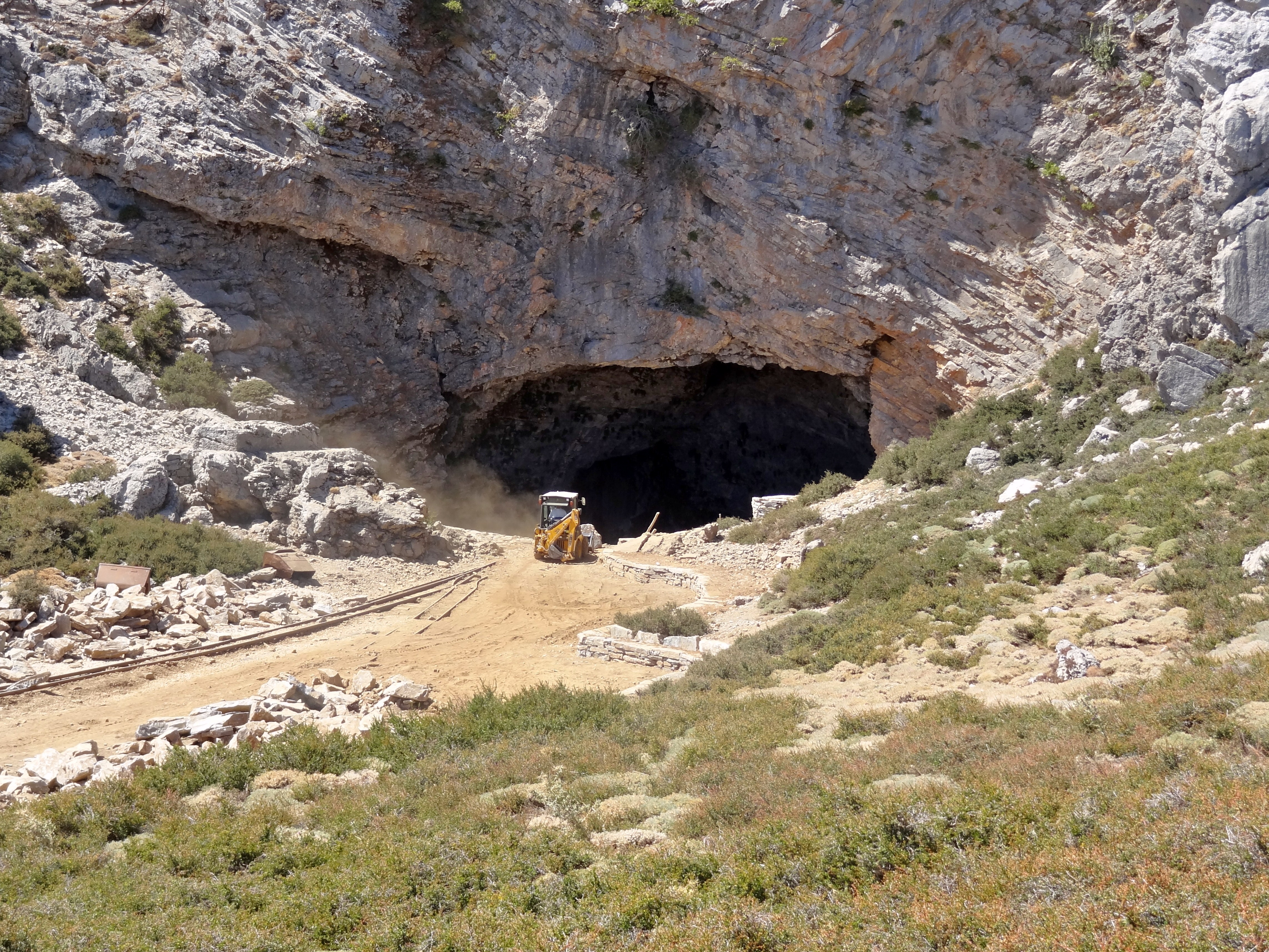 Idäische Grotte an der Nida-Hochebene, Gemeinde Anogia, Regionalbezirk Rethymno, Kreta, Griechenland